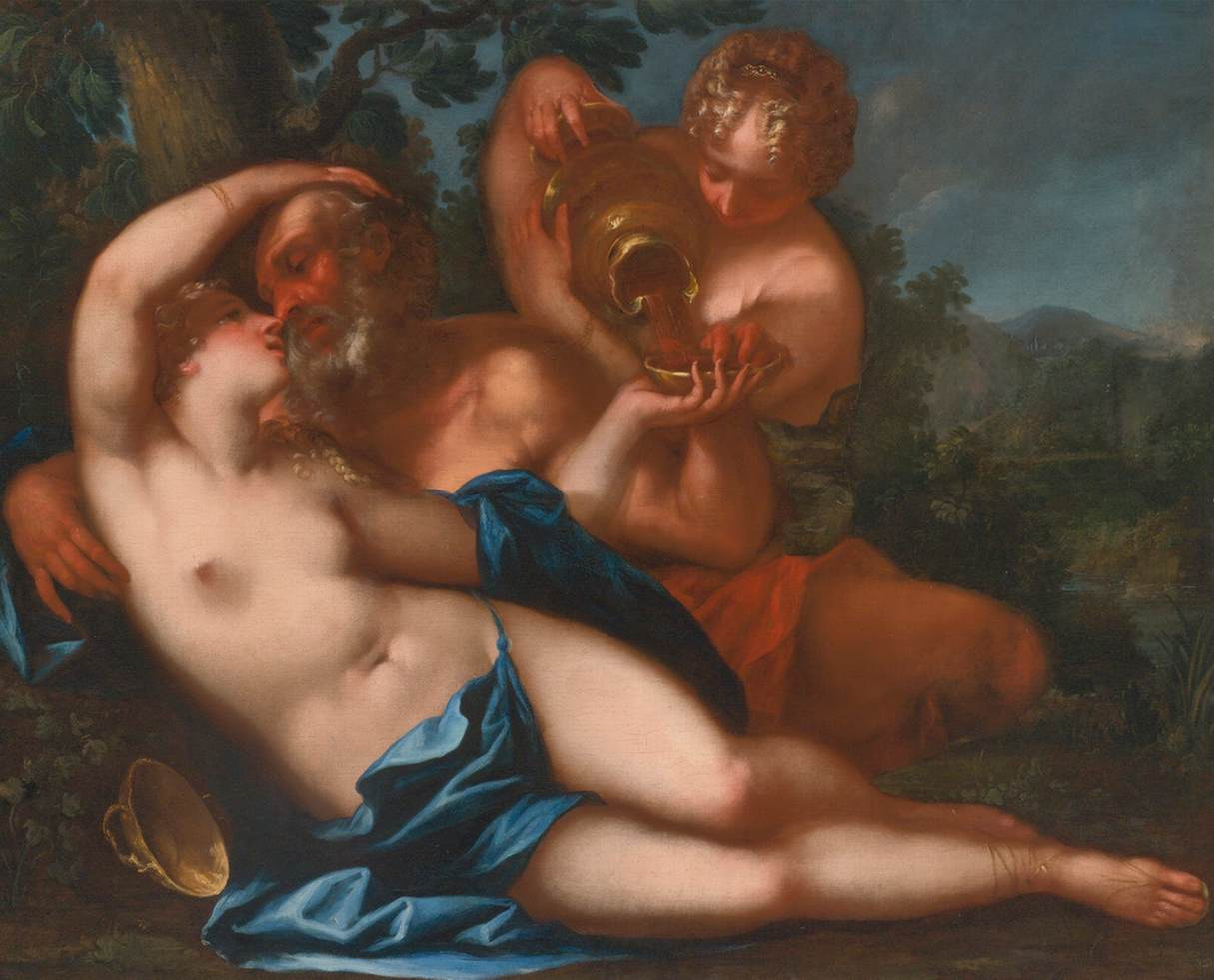 Federico Cervelli - Lot and his daughters 1680 circa olio su tela - 135 x 167 cm Private collection